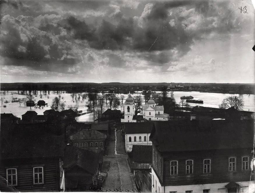 Беларуская (тарашкевіца): Магілёў (Mahiloŭ), вуліца Пакроўская (vulica Pakroŭskaja). Царква Покрыва Багародзіцы